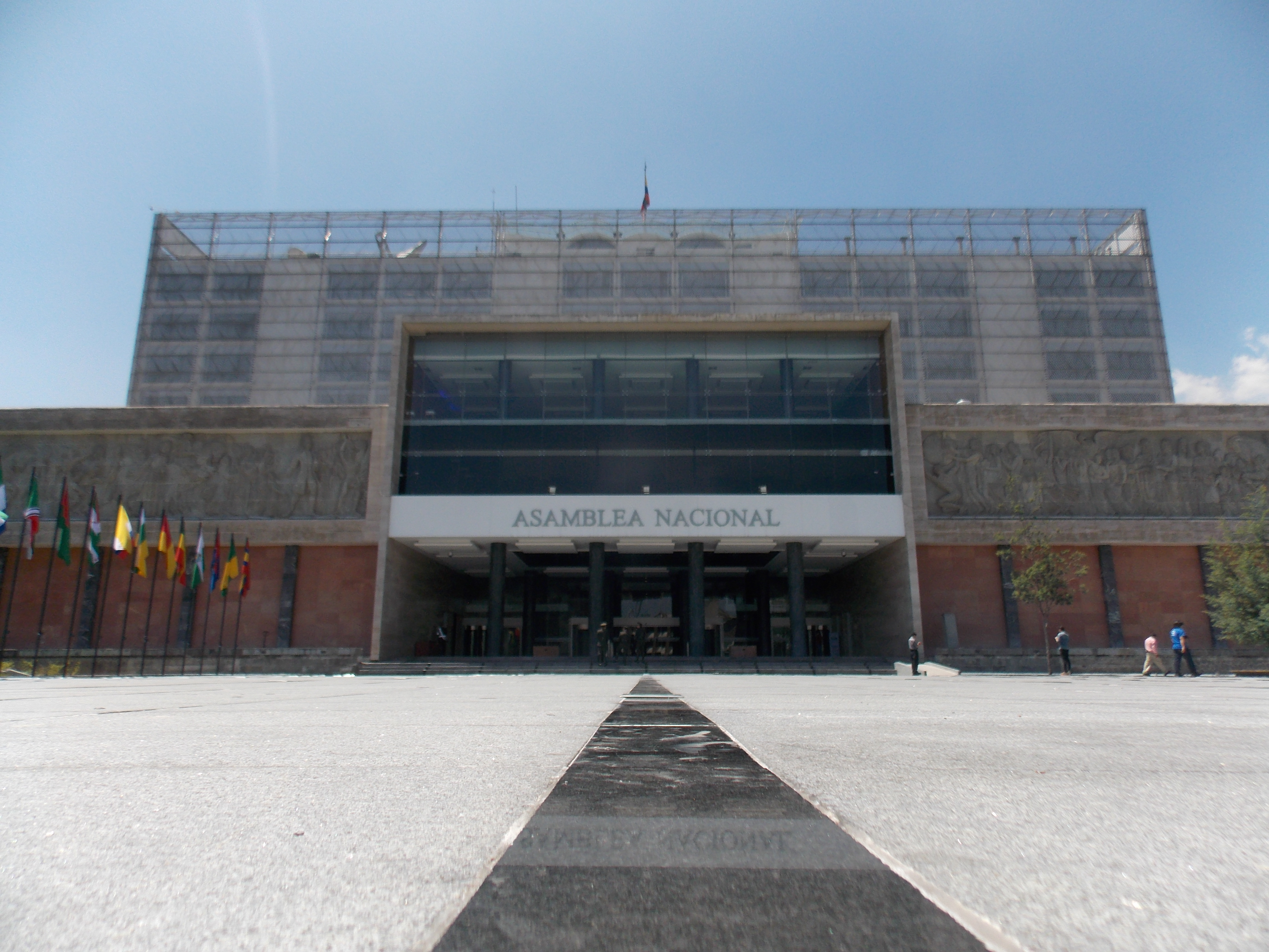 Fachada principal del palacio.